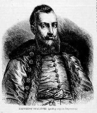 Krzysztof Opaliński